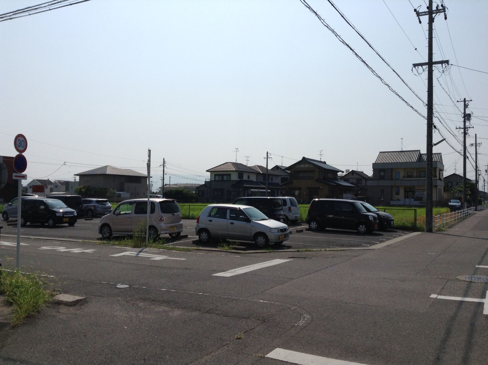 愛西市渕高町字蔭島の様子